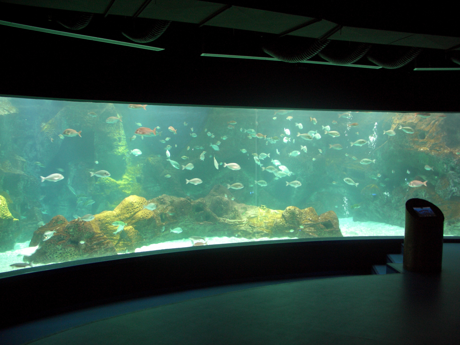 Large tank in Cretaquarium